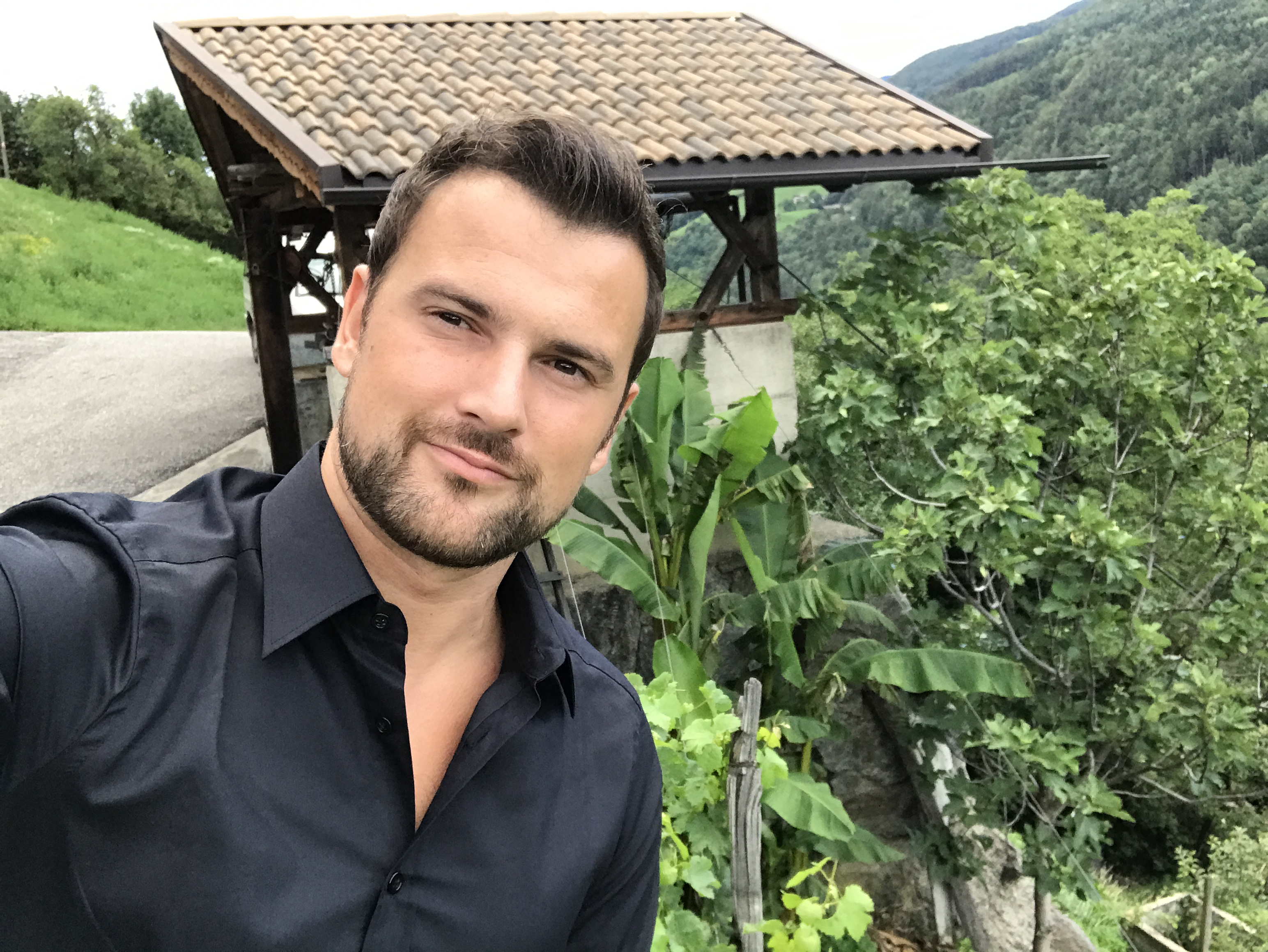 Sigi Fink zu Hause in Südtirol.